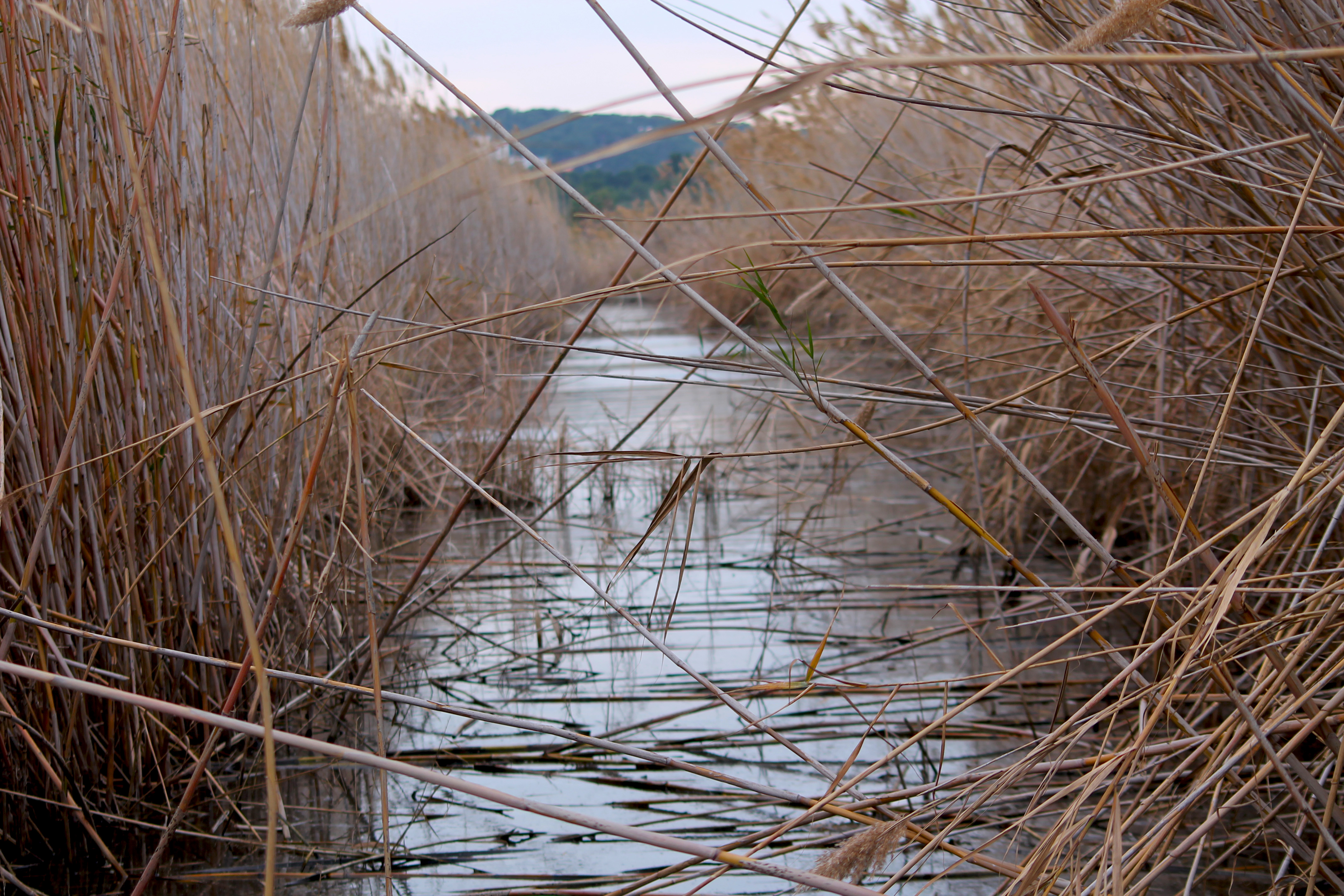 Sèquia Major This is a photography of a Site of Community Importance in Spain with the ID: ES5140004. Natura2000 entry, EEA entry